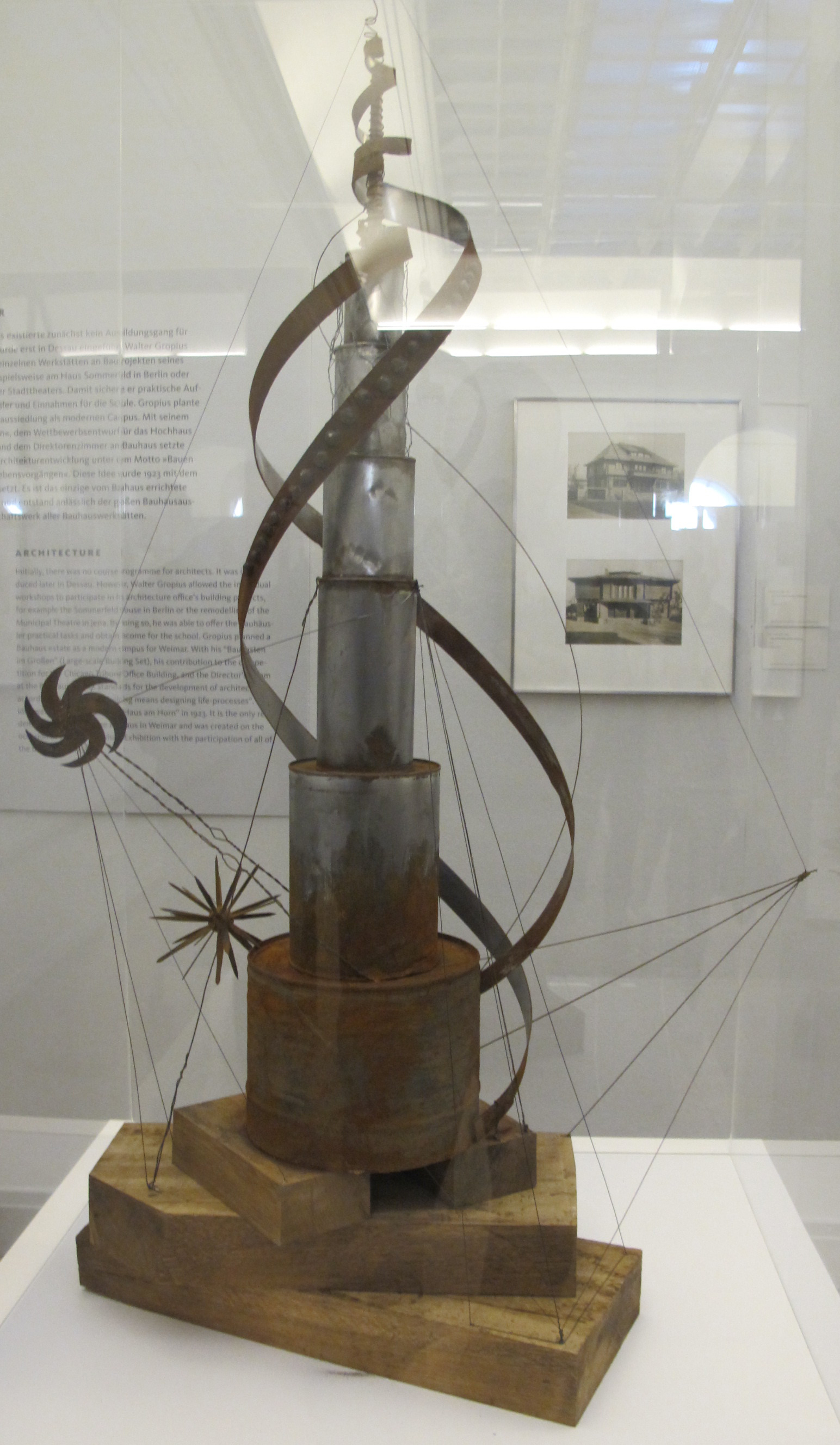 Nikolaij wassiljew, studio sui materiali, 1920 ca